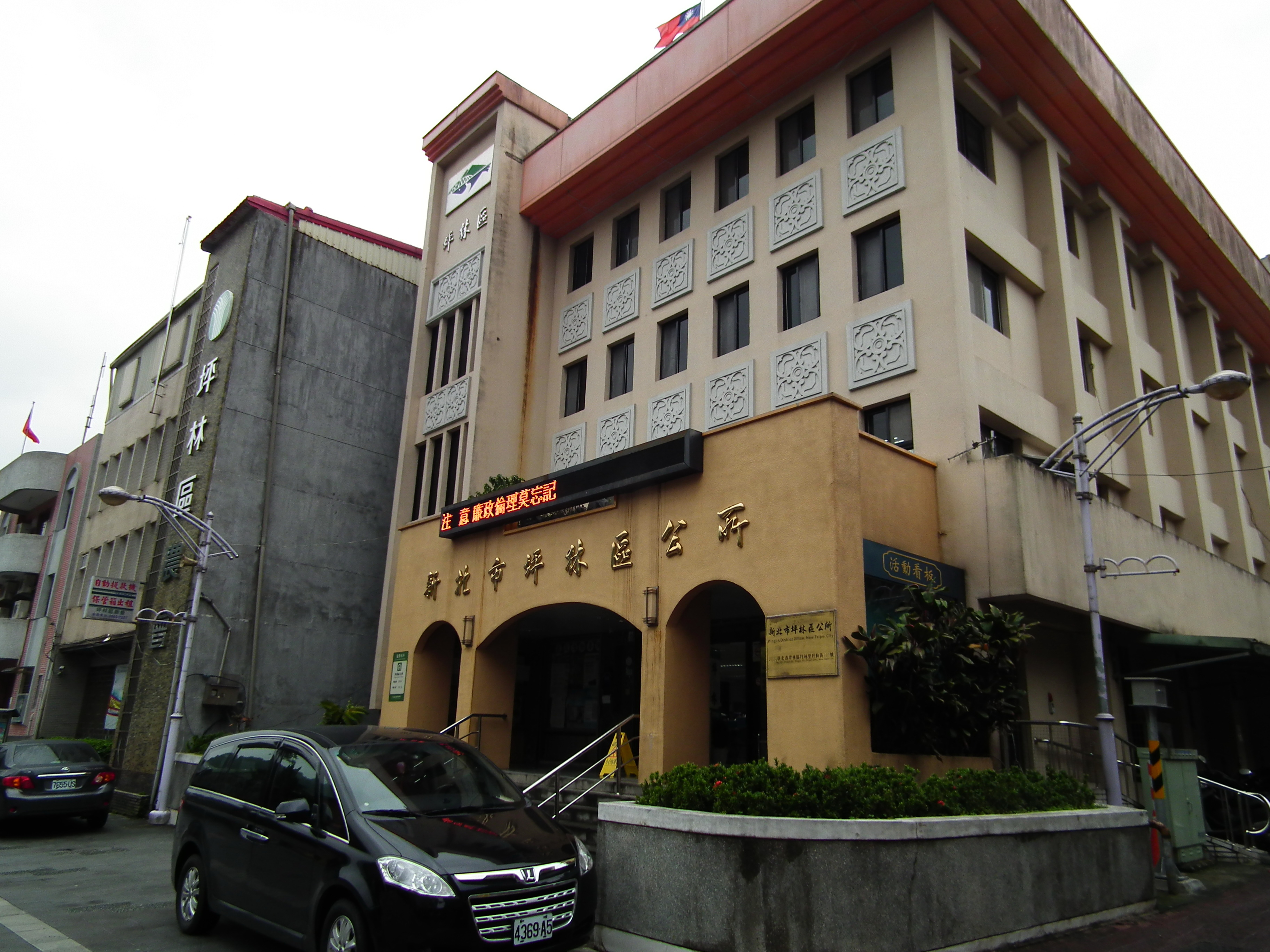 新北市坪林區公所